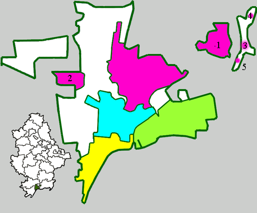 Жовтневый Ильичёвский Орджоникидзевский Приморский Населённые пункты: 1 – Сартана 2 – Старый Крым 3 – Талаковка 4 – Гнутово 5 – Ломакино